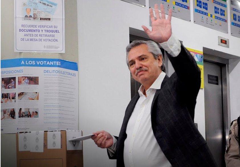 Alberto Fernández votando en las elecciones primarias de Argentina de 2019, en las cuales obtuvo una amplia victoria ante el presidente en ejercicio Mauricio Macri.